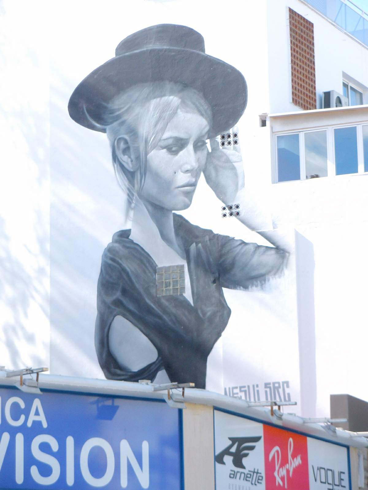 Plaza Costa del Sol (Torremolinos, Málaga)